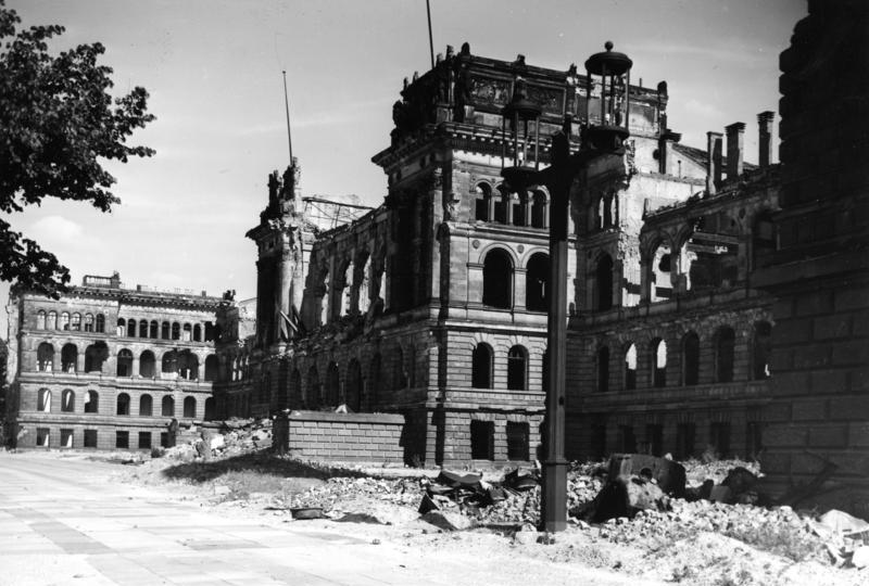 1951 Berlin Technische Universität Charlottenburg